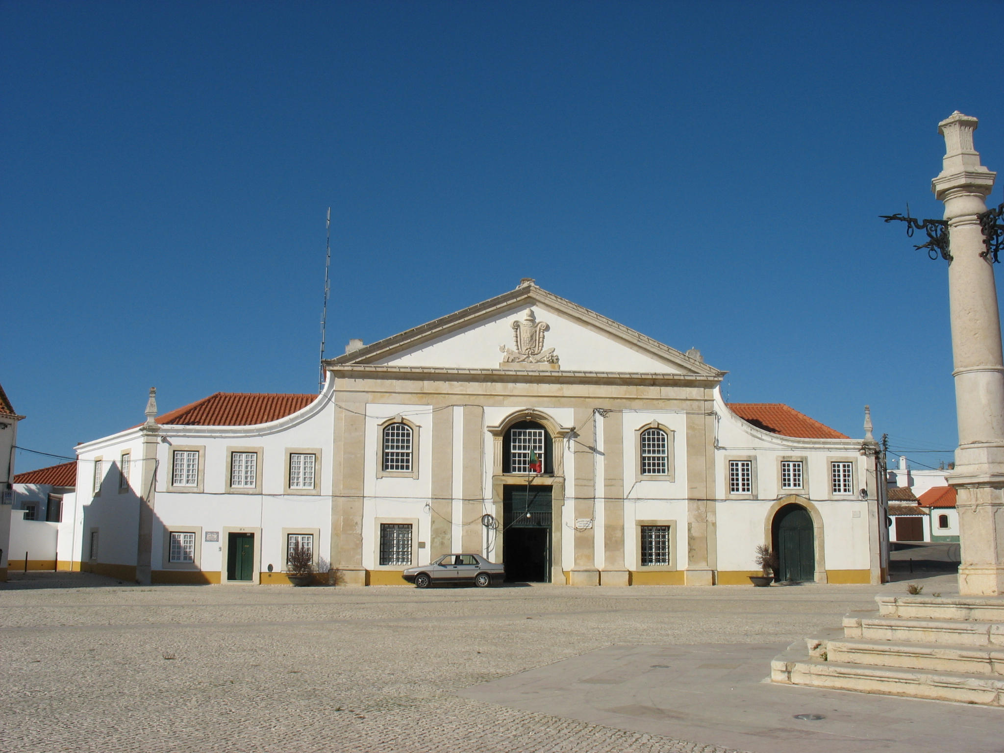 antiga Casa da Câmara de Manique do Intendente (actual posto da GNR)